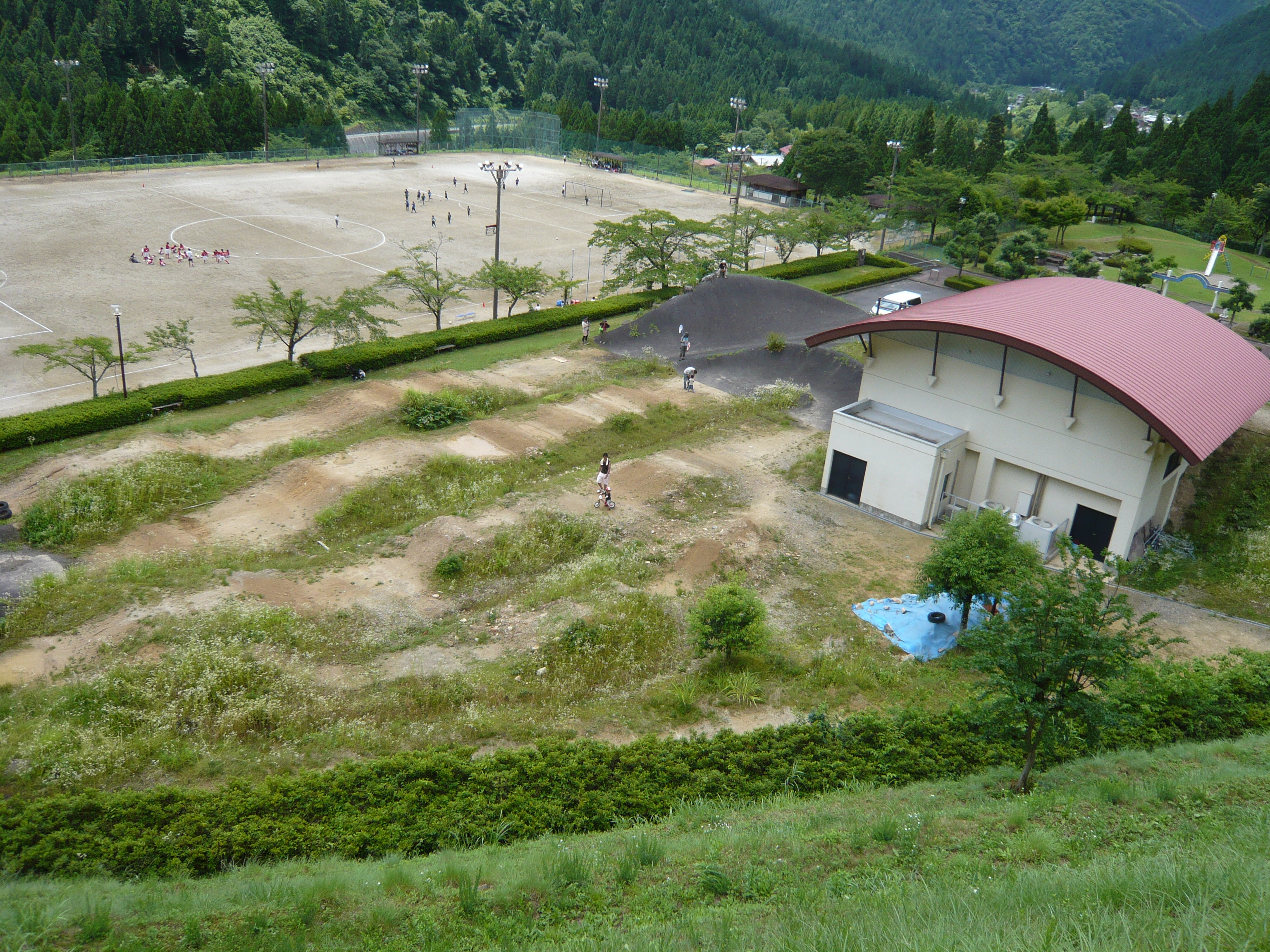 関市板取運動公園